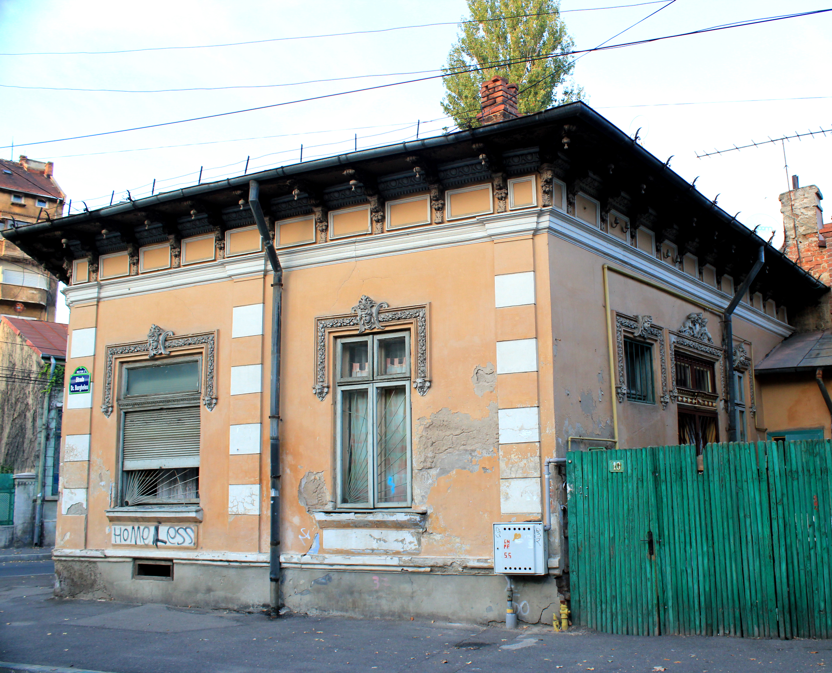 Casă Burghelea 13